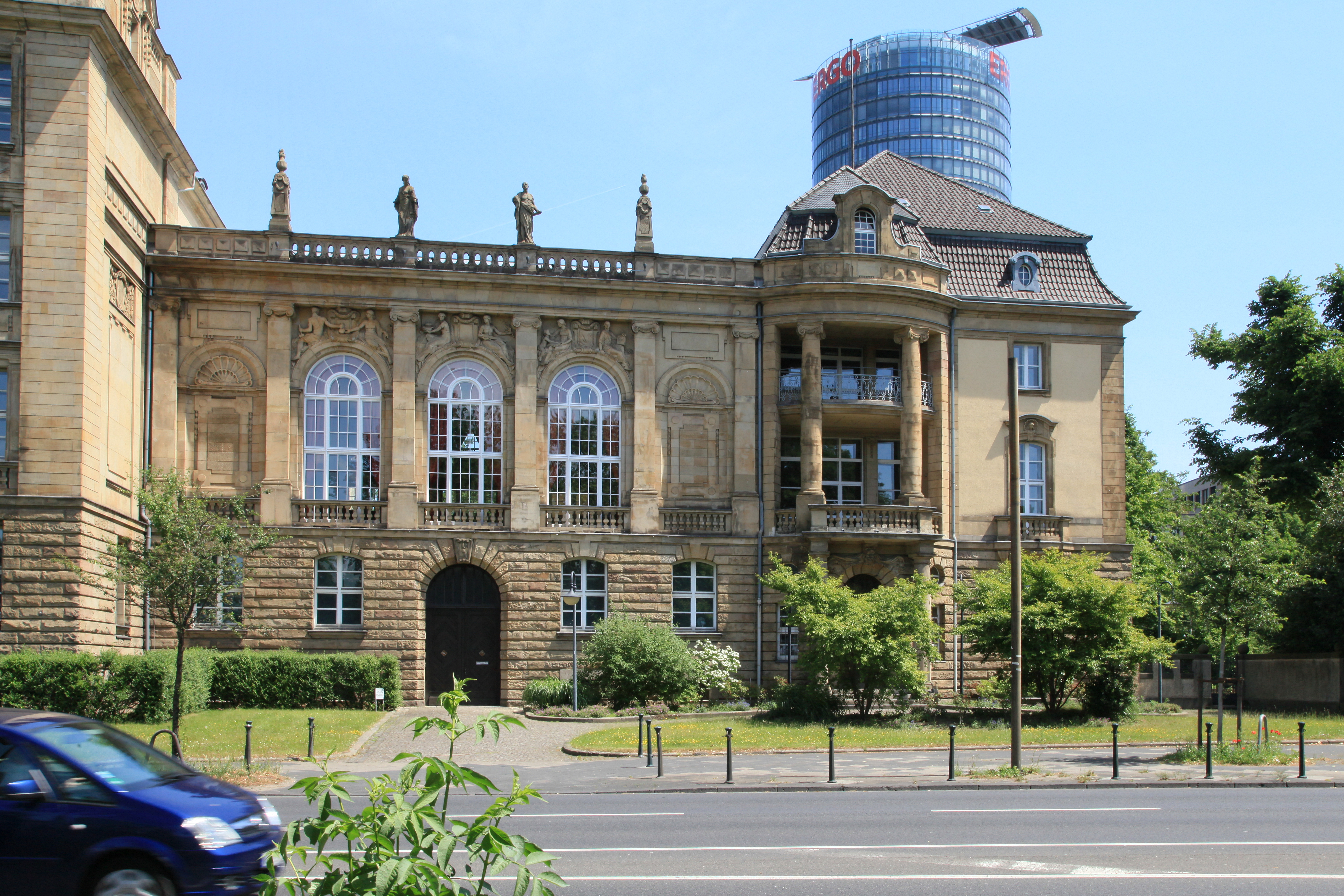 Bezirksregierung, Cecilienallee 1–2 in Düsseldorf